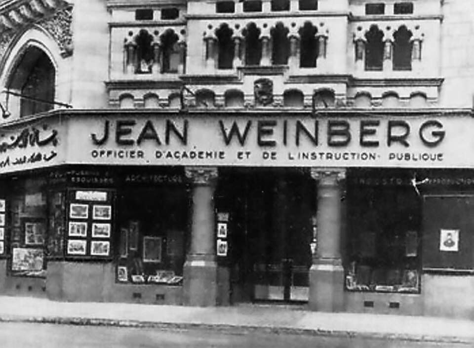 مصرى: ستوديو جان فاينبرج فى وسط القاهره